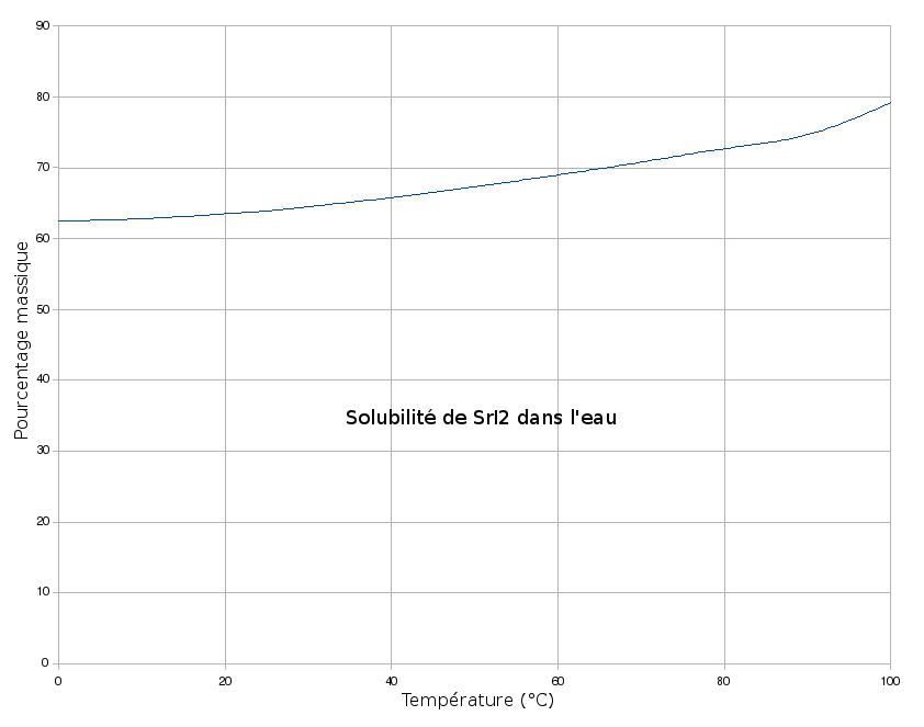 Solubilité de SrI2 dans l'eau en fonction de la température.